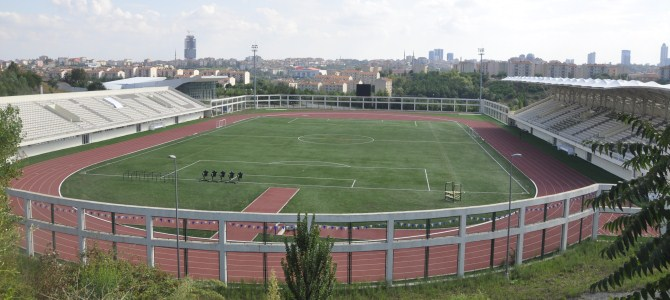 İTÜ Stadyumu